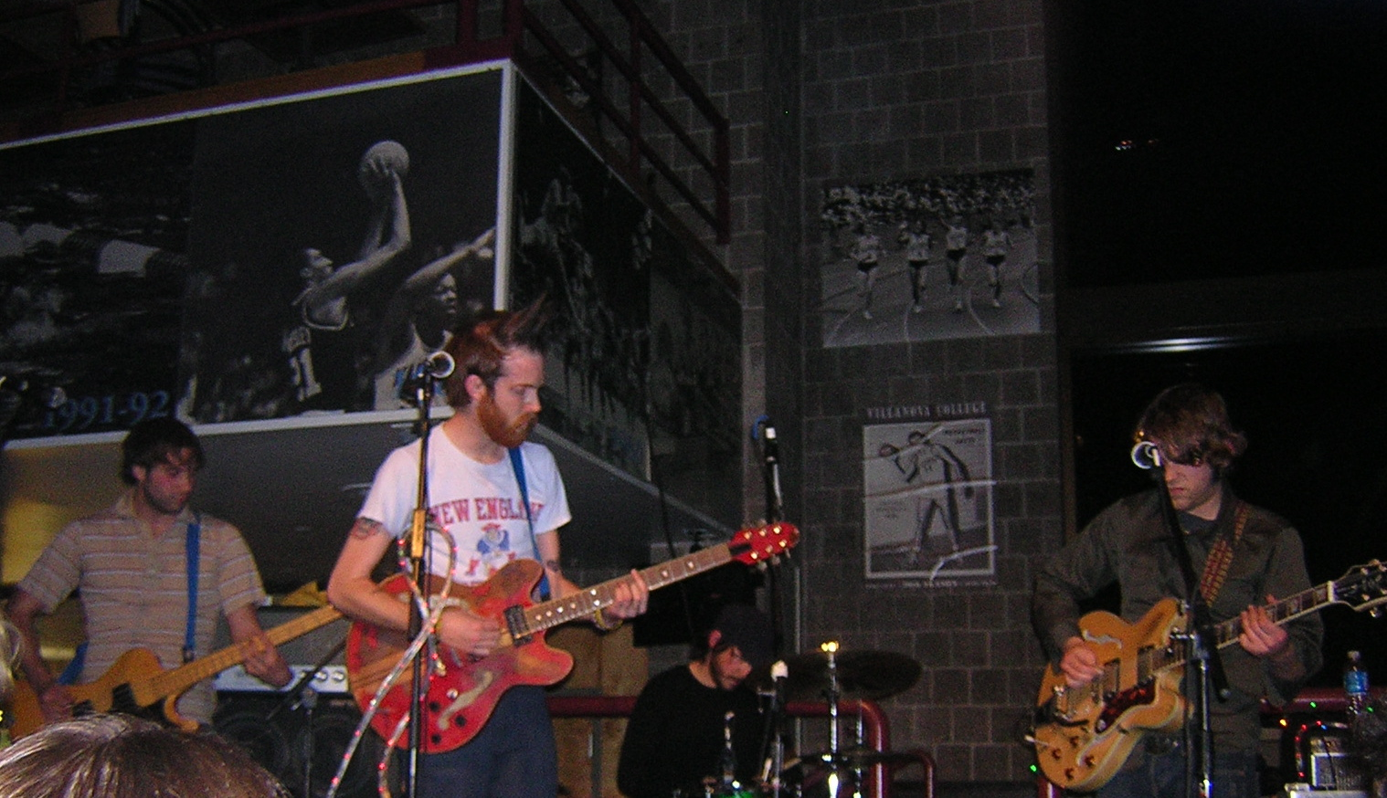 villanova university villanova, pennsylvania